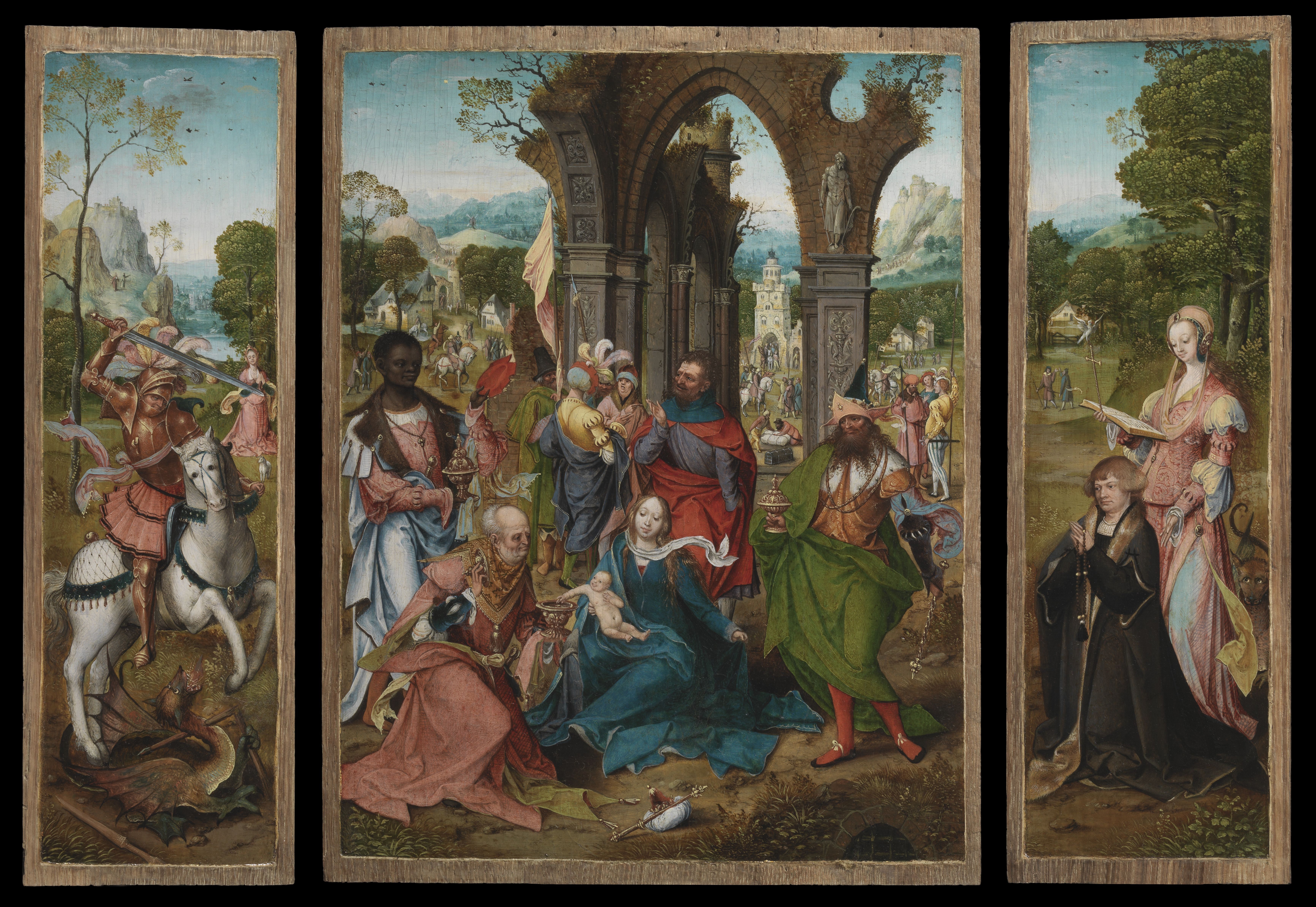 schilderij ( Meester van de Aanbidding te Antwerpen, koninklijk museum voor schone kunsten antwerpen